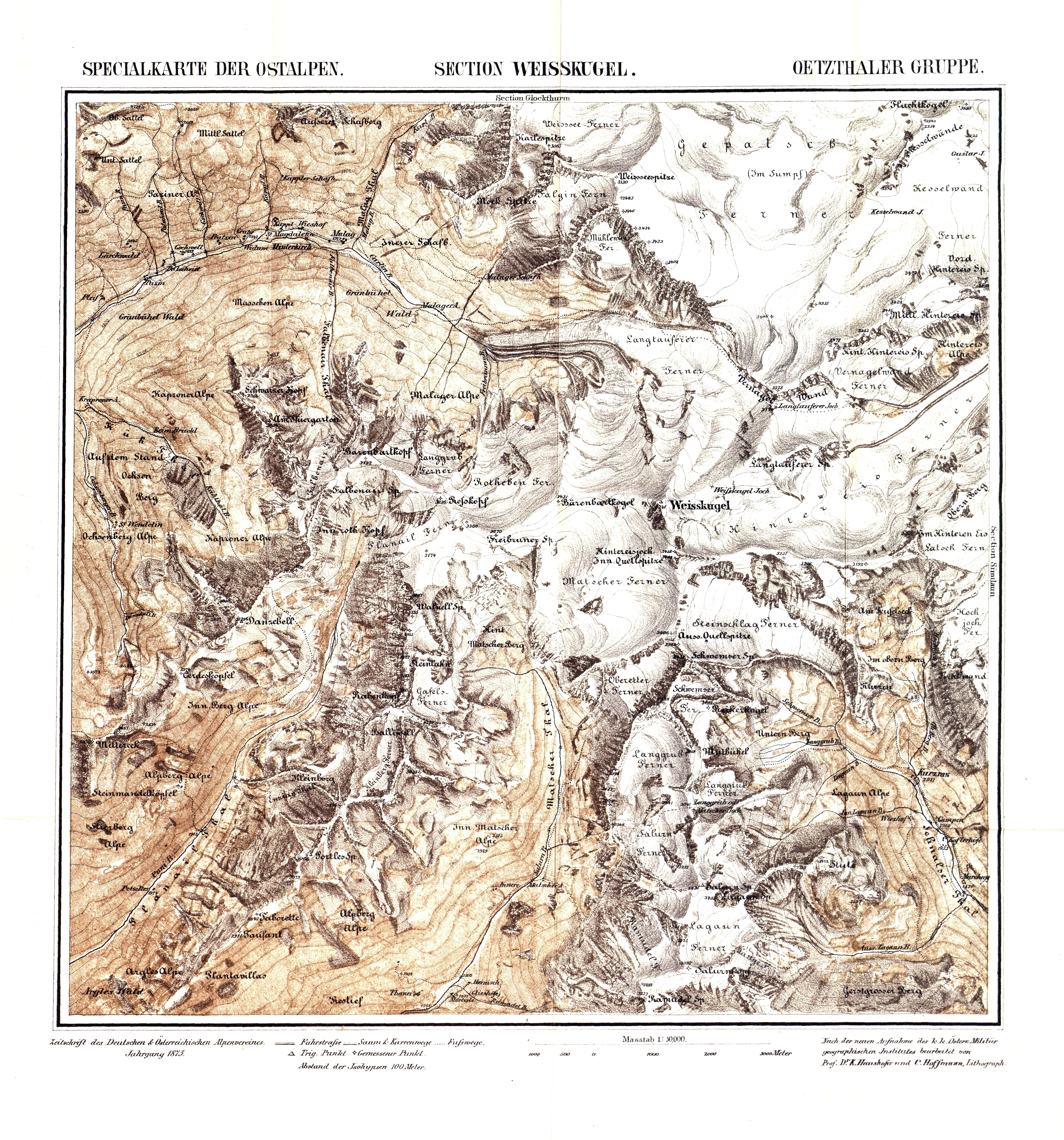 Specialkarte der Ostalpen Section Weisskugel aus Zeitschrift des Deutschen und Oesterreichischen Alpenvereins 1875 Band 6